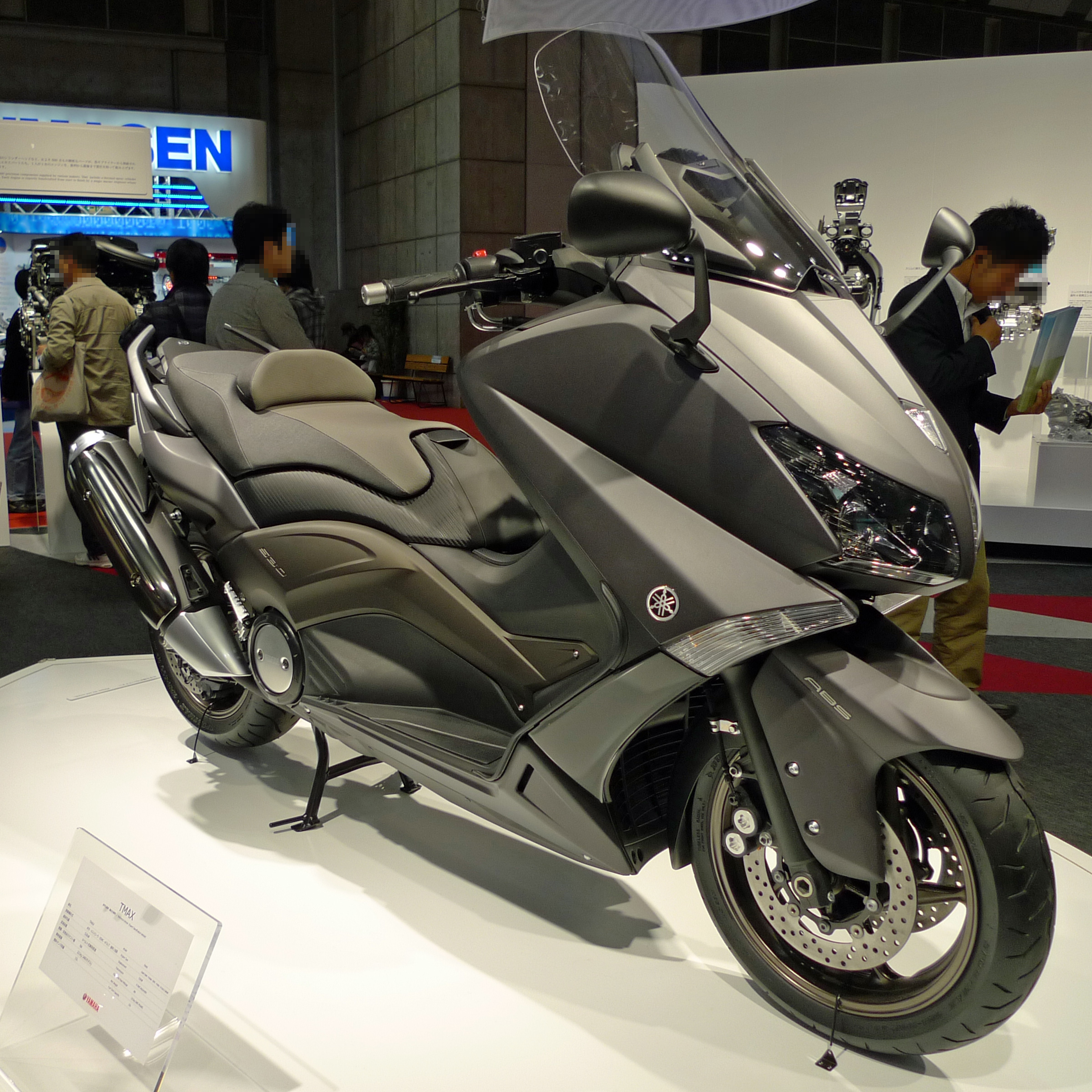 ヤマハ・TMAX2012年 東京モーターショー2011にて撮影